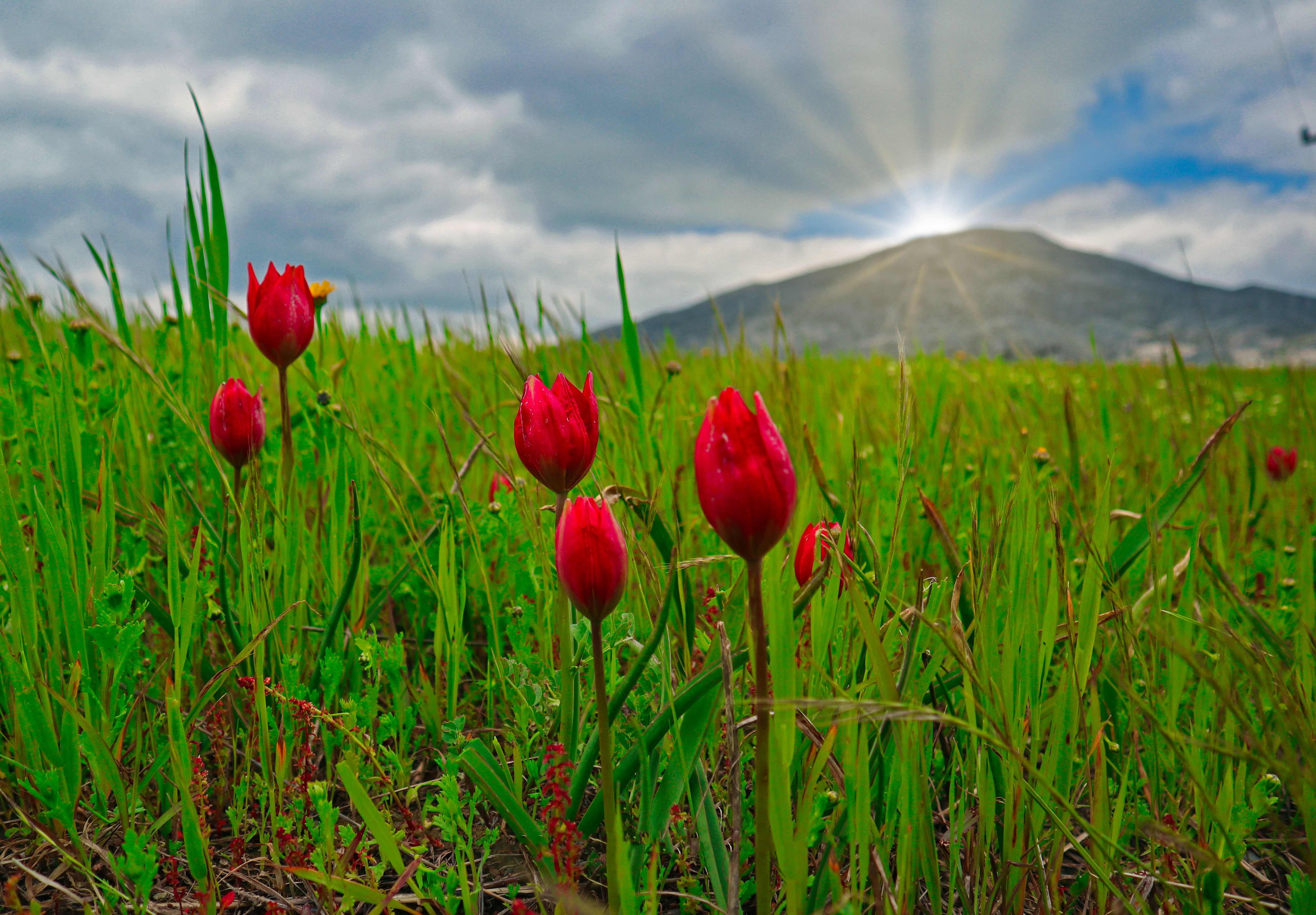 Ενδημική τουλίπα της Κρήτης που φύεται μόνο στον Γιούς κάμπο. This is a photography of Natura 2000 protected area with ID GR4330006